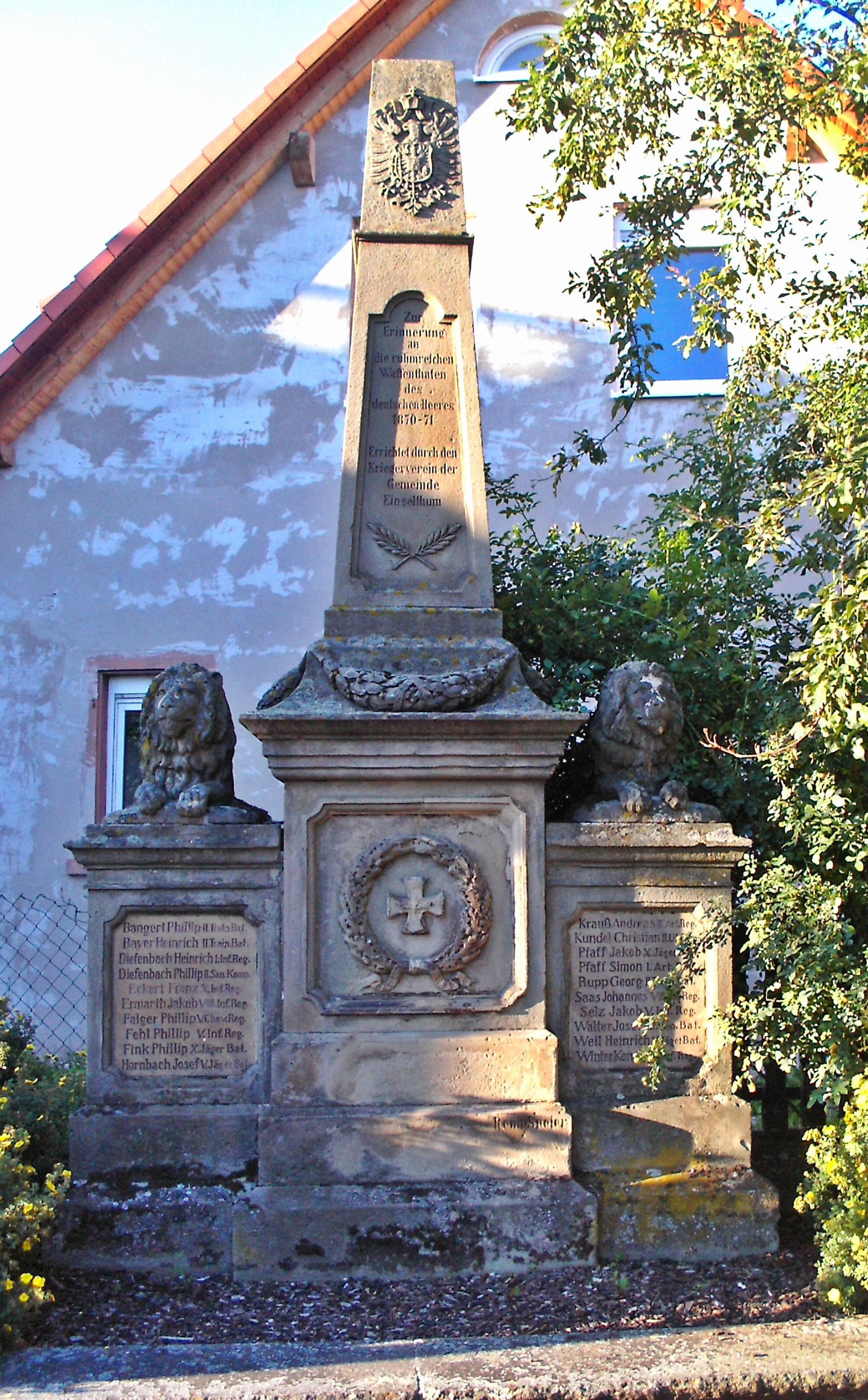 Einselthum, Pfalz, Kriegerdenkmal 1870/71, von Gottfried Renn aus Speyer